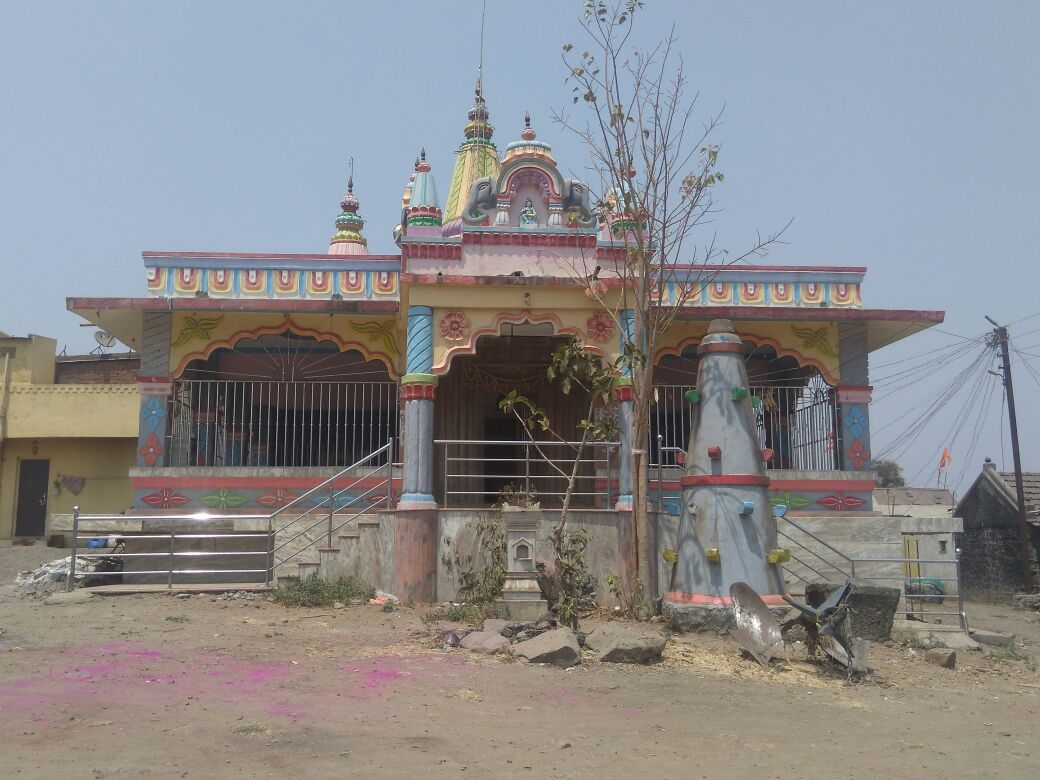 ग्रामदैवत भैरवनाथ मंदिर